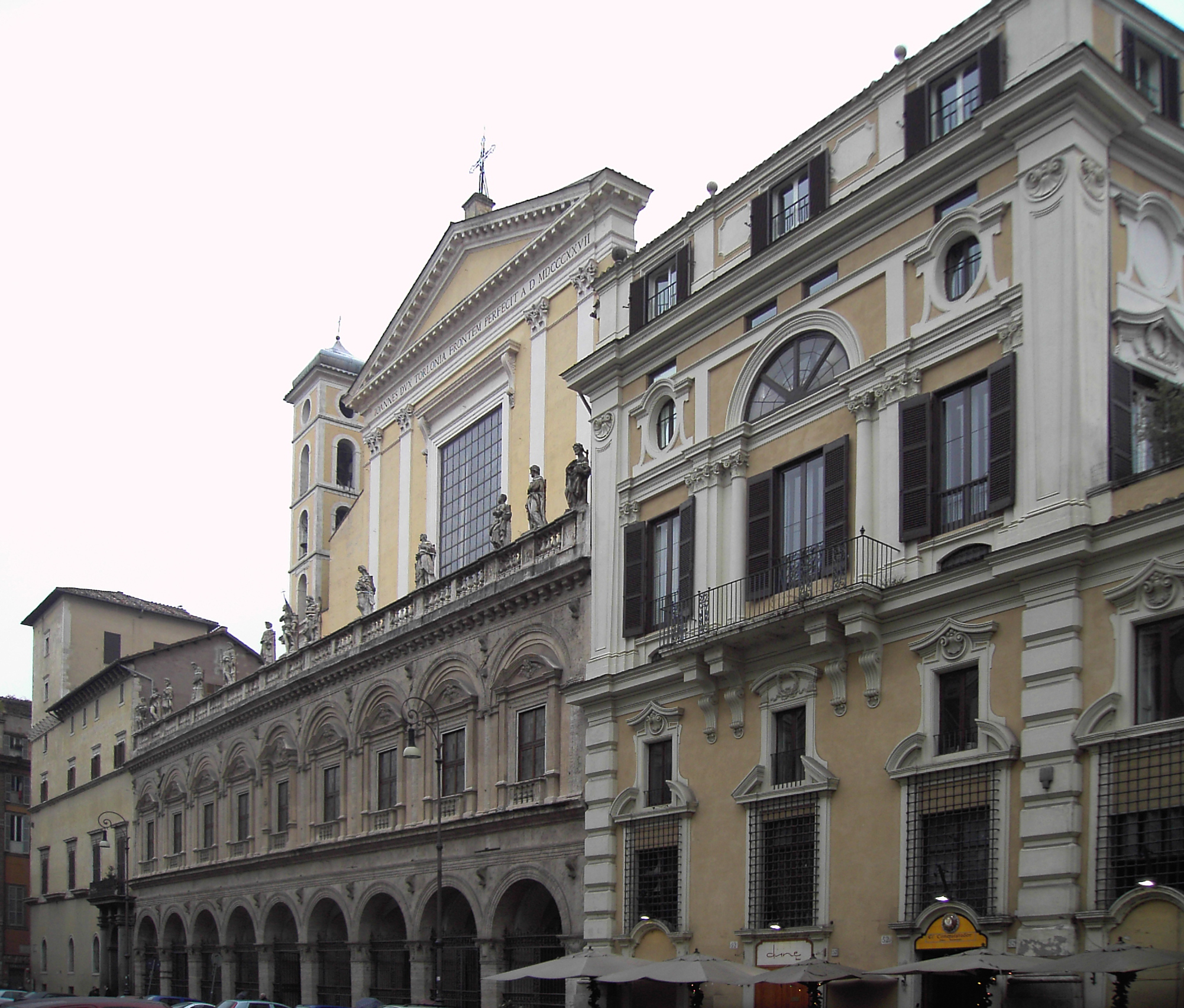 Roma, piazza santi Apostoli: palazzo Colonna e prospetto della basilica.